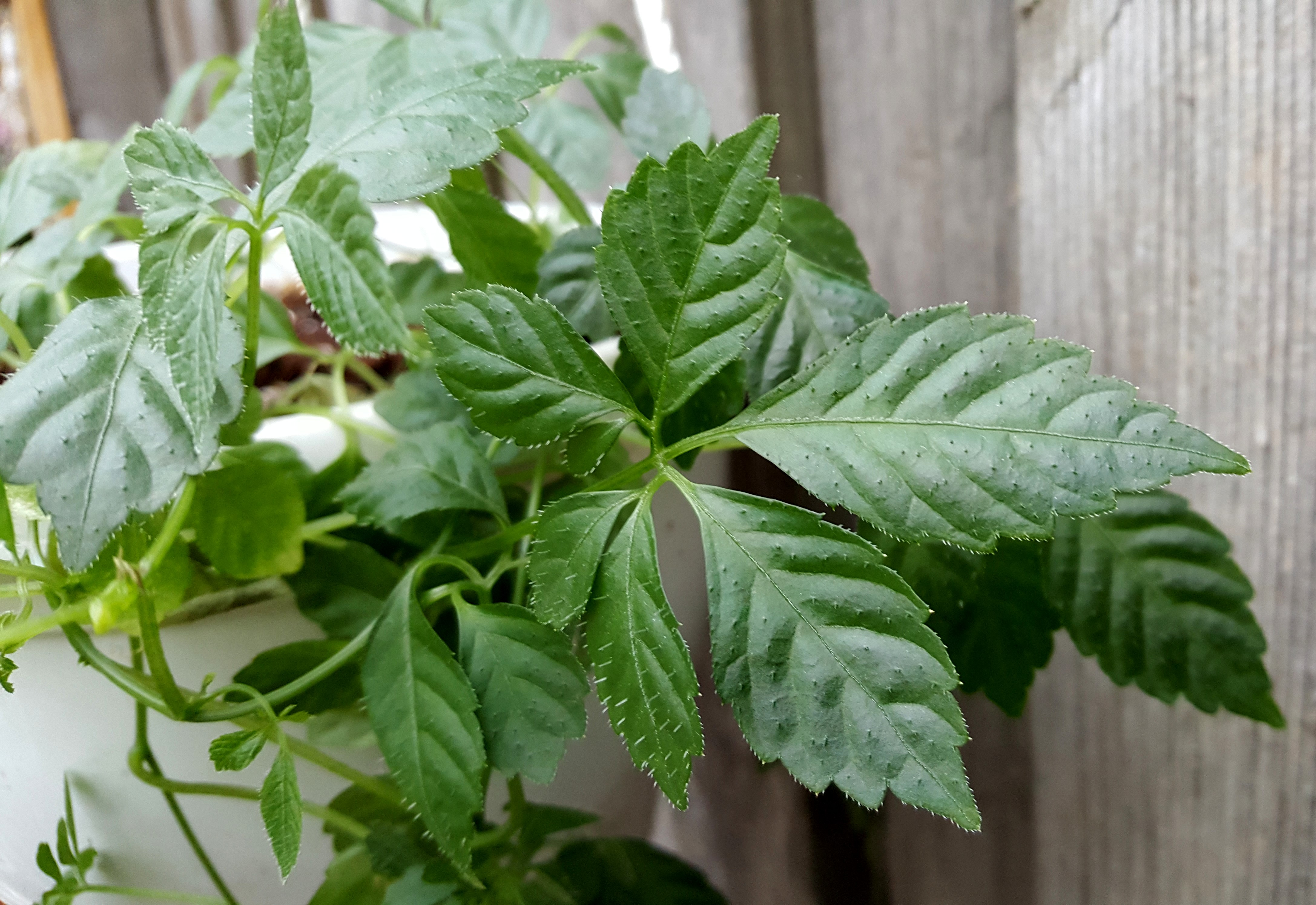 Jiaogulan-Pflanze siebenblättrig